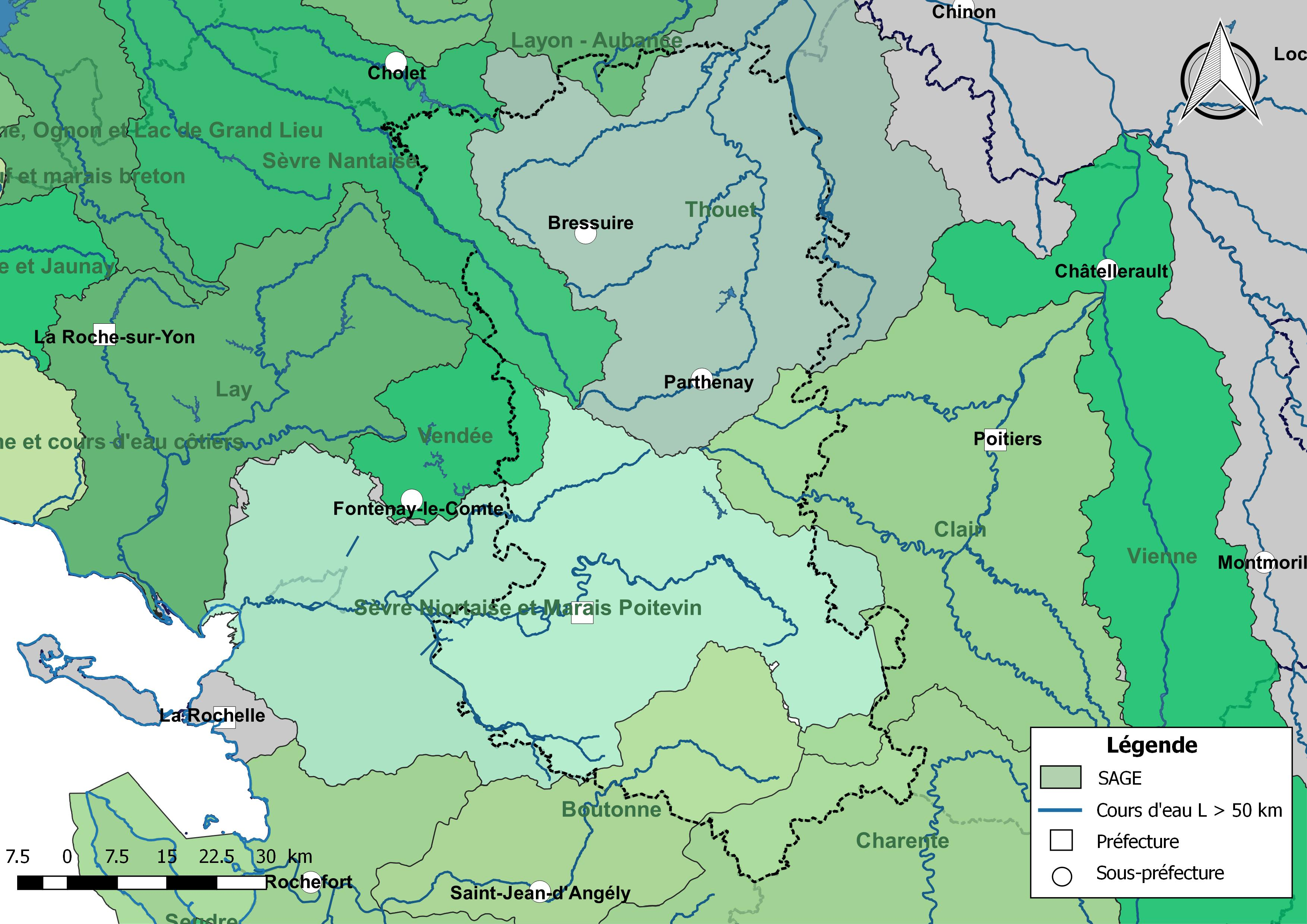 Carte des schémas d'aménagement et de gestion des eaux (SAGE) concernant le département des Deux-Sèvres (France) au 1er janvier 2018.